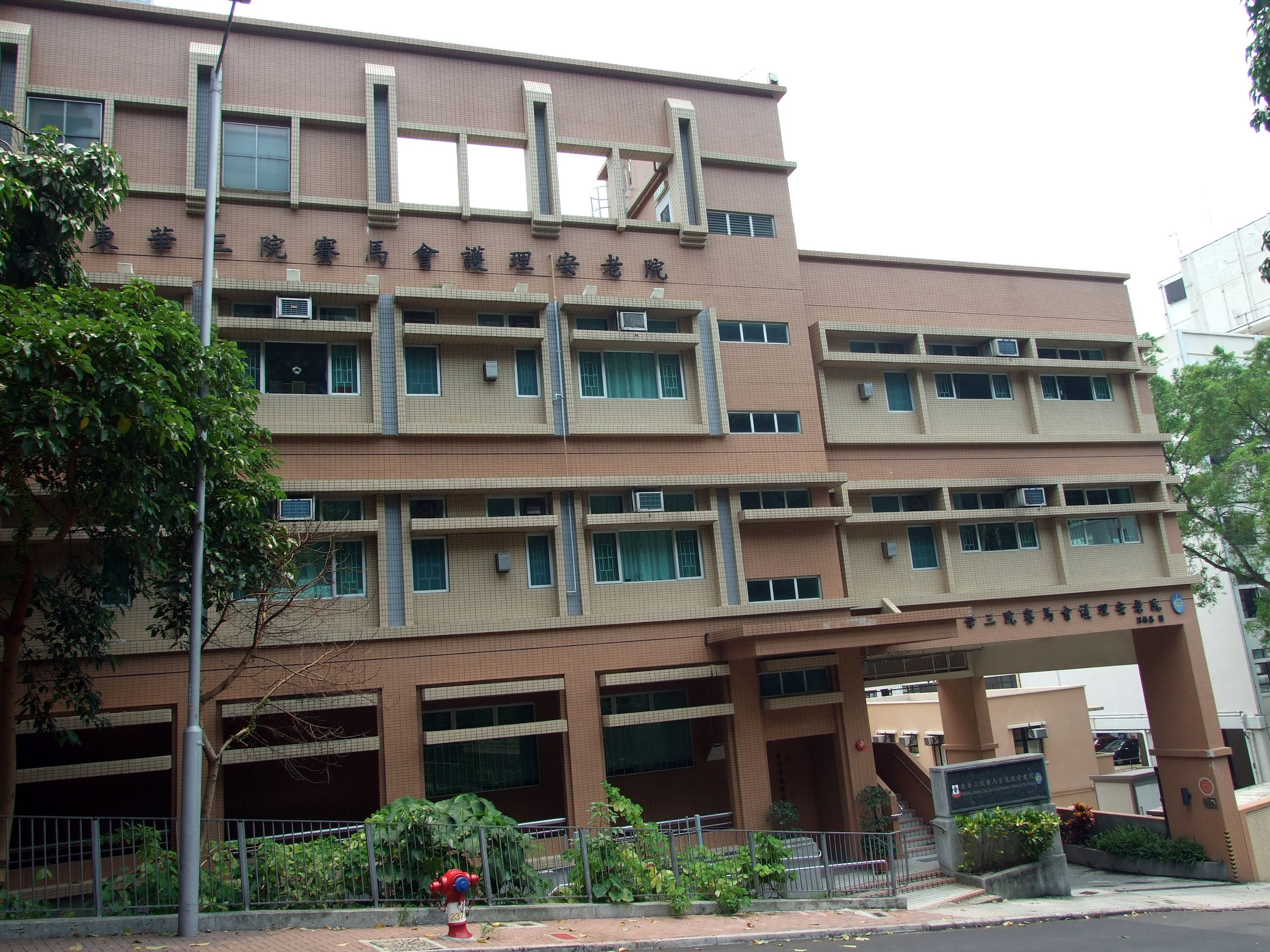 中文（香港）: 東華三院賽馬會護理安老院